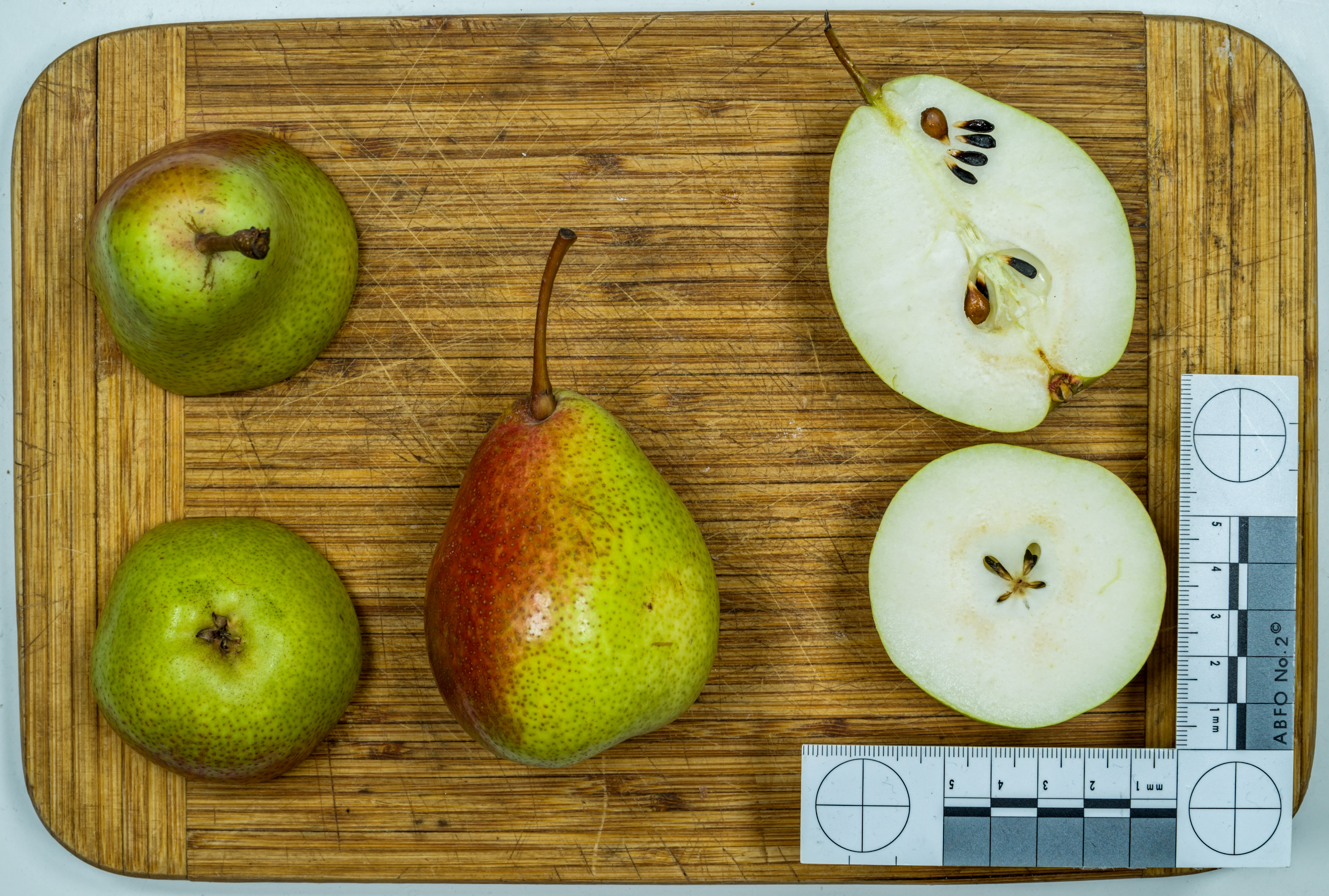 Birnensorte: Forellenbirne, Forelle, Herbstforellenbirne, Beckenbirne